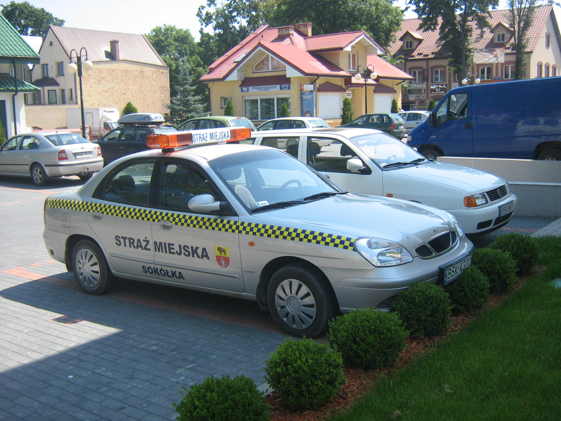 Straż miejska w Sokółce. Samochód Daewoo Nubira drugiej generacji wyprodukowany przez FSO.